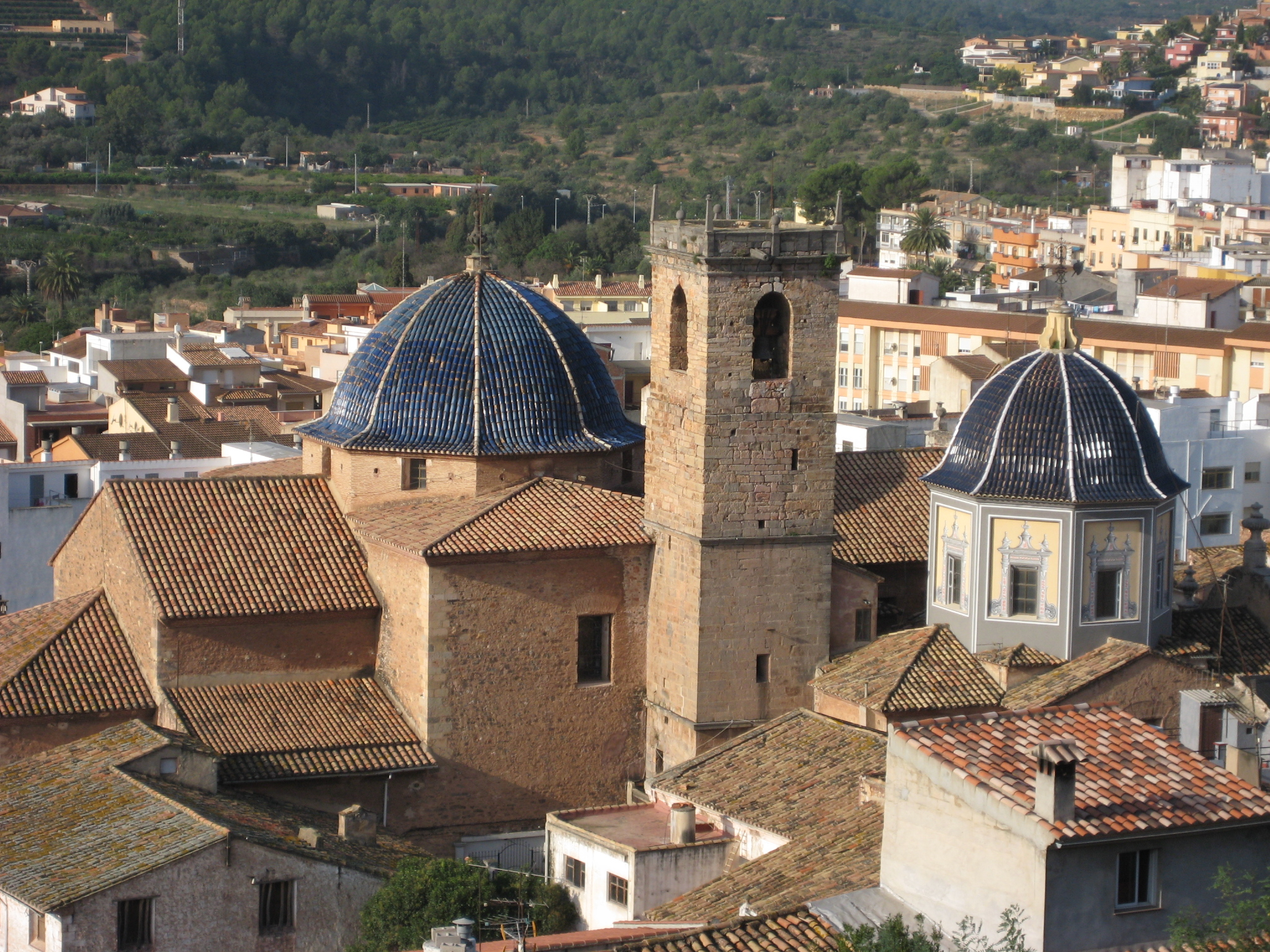 Església de l'Assumpció d'Onda, des del Castell